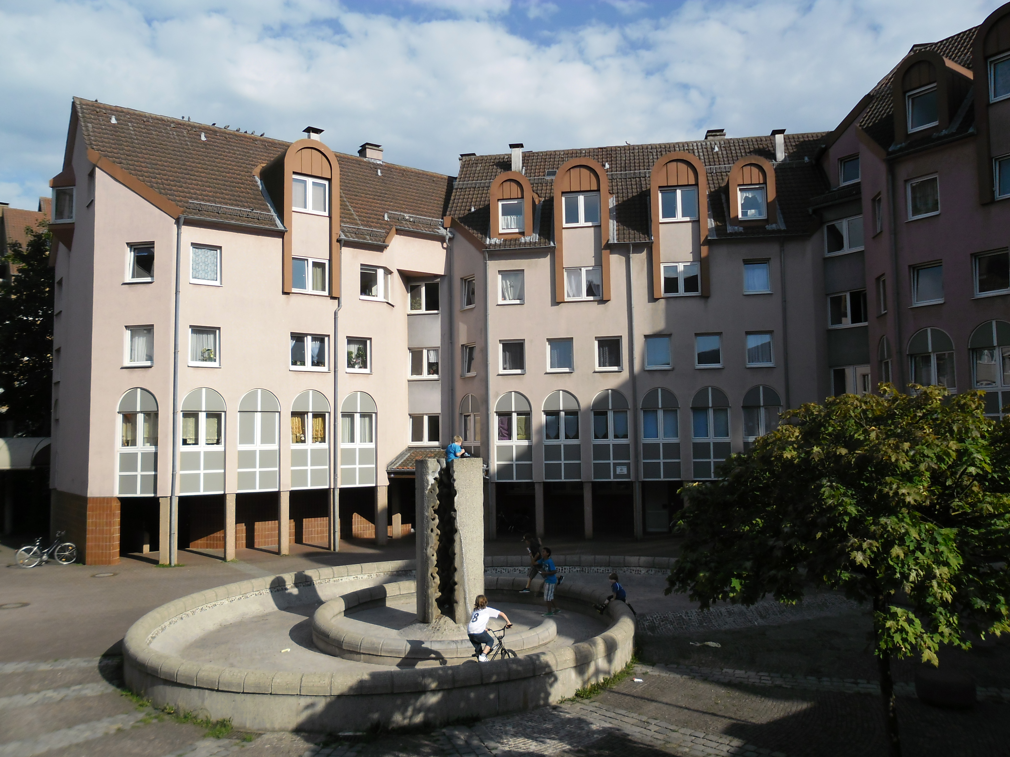 Wohngebietsinnenhof mit zentralem Brunnen am westlichen Ende des Euckenweges in Langwasser Nordost